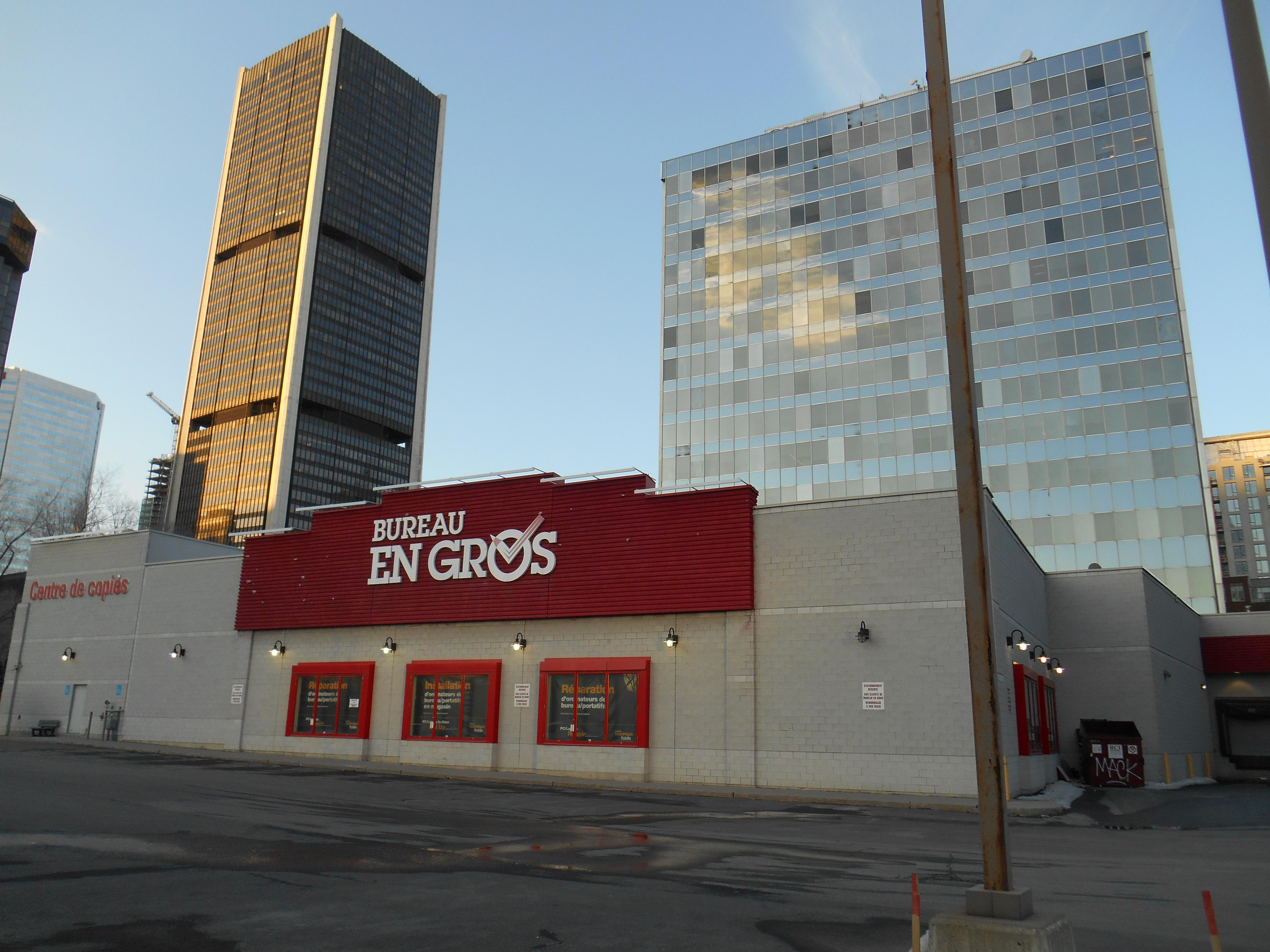 Bureau en Gros, 770, rue Notre-Dame Ouest, Montréal, vu de la rue Duke À gauche, la tour de la Bourse